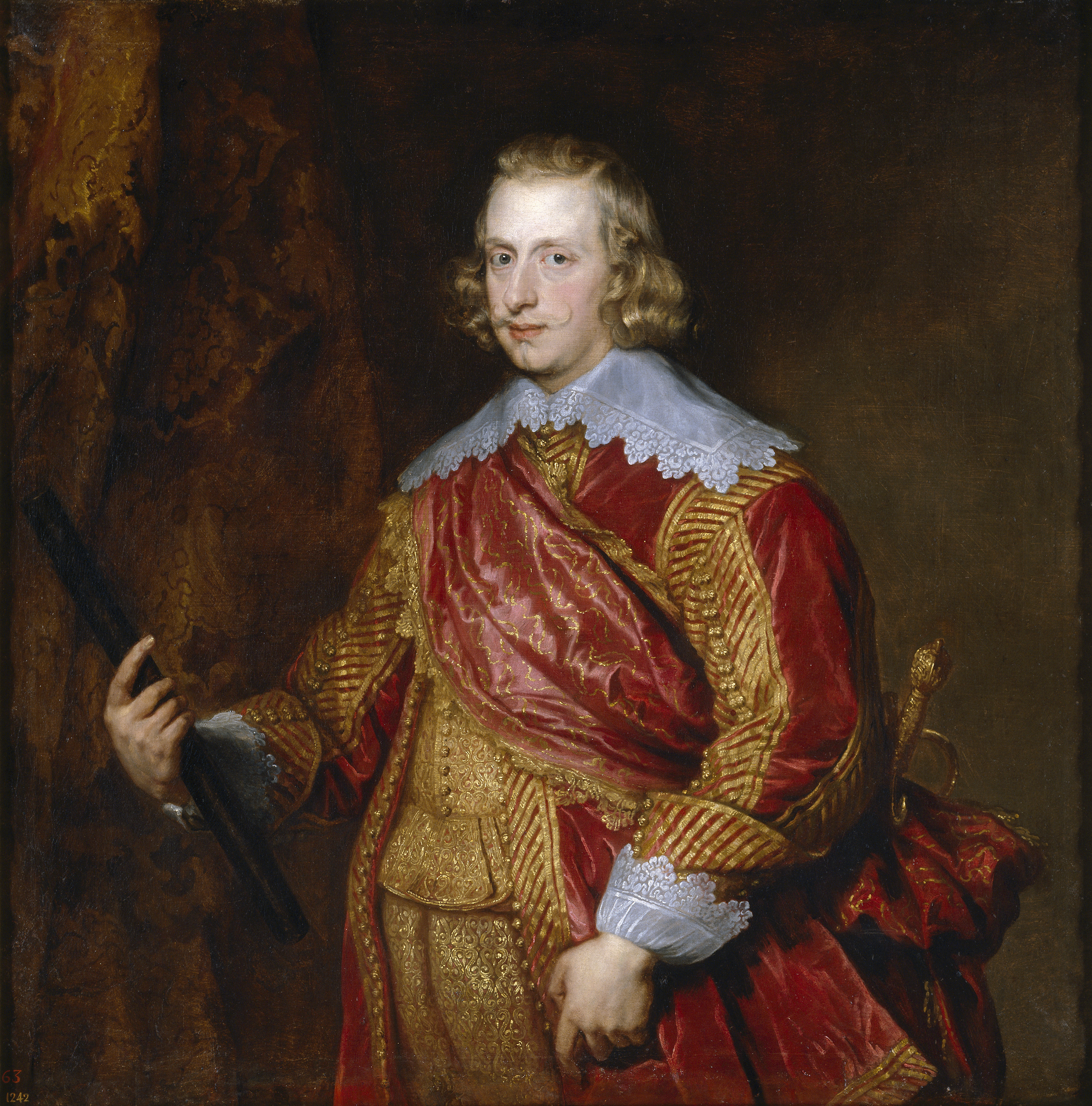 Retrato del cardenal-infante Fernando de Austria († 1641), que fue hijo del rey Felipe III de España y se hizo célebre por derrotar aplastantemente al ejército sueco en 1634 en la batalla de Nördlingen.